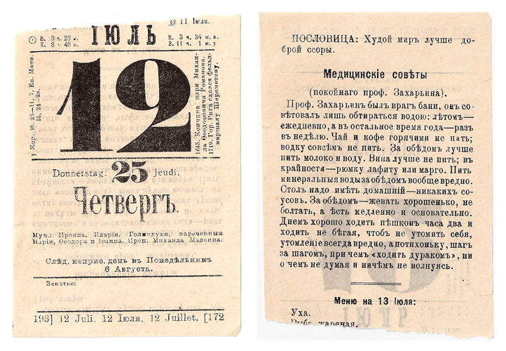 Лист отрывного календаря на 12 июля.